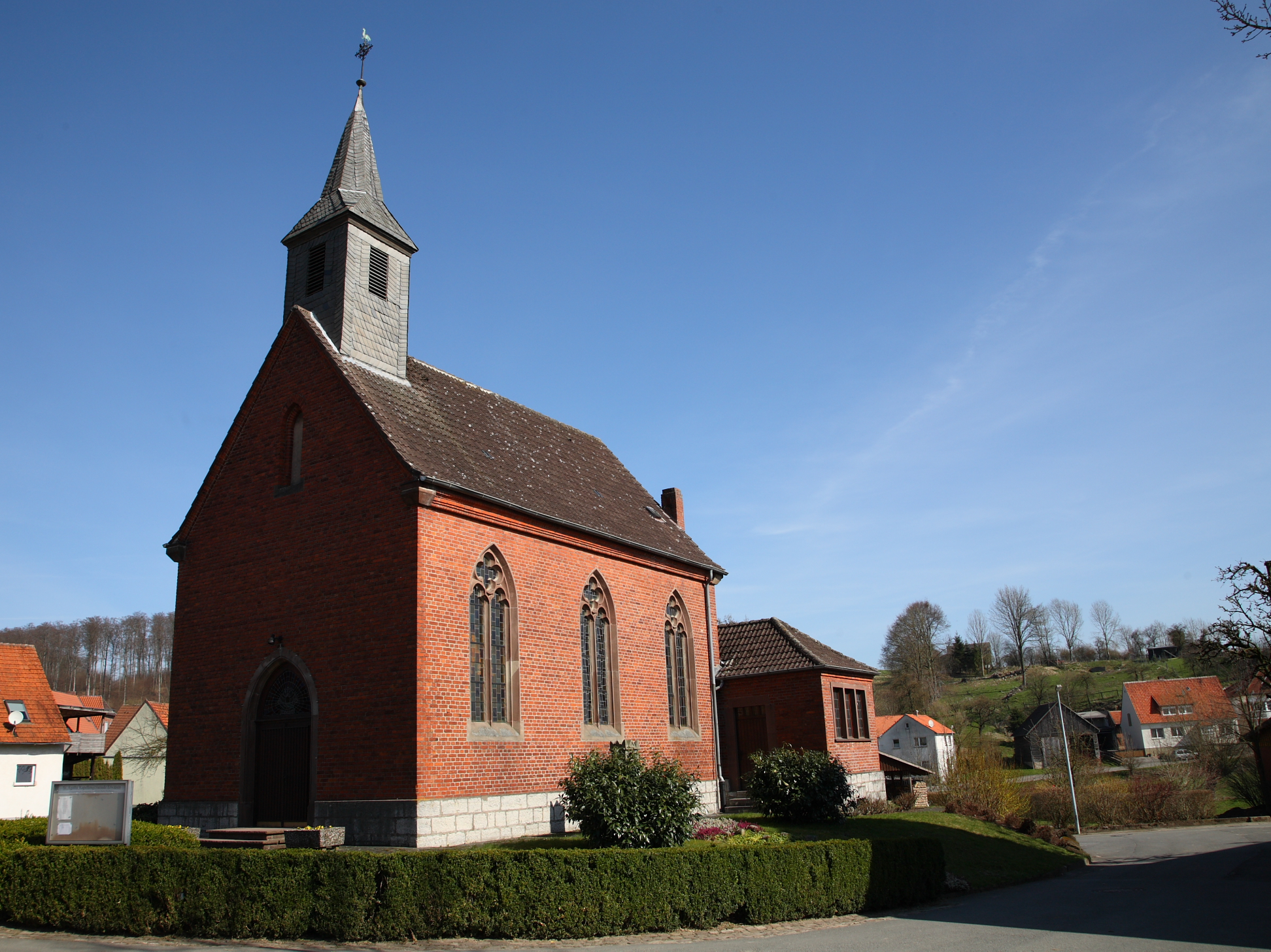 Erwitzen, Sankt-Agatha-Kapelle